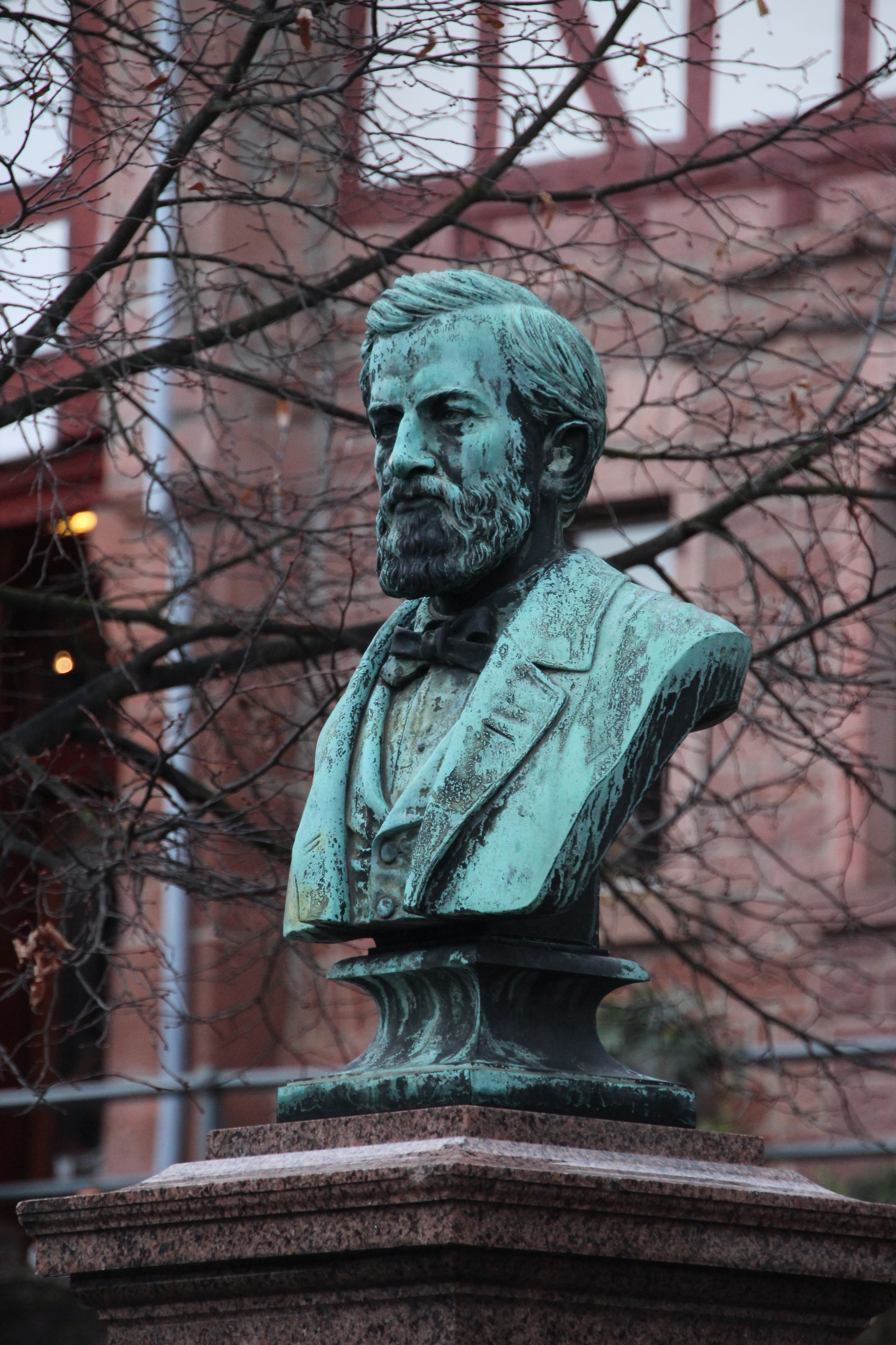 Bildinhalt: Philipp-Reis-Denkmal am Untermarkt in Gelnhausen. Bildhauer Anton Karl Rumpf. Inschrift auf der Rückseite: "A. C. Rumpf. fec. 1884" Aufnahmeort: Gelnhausen, Deutschland